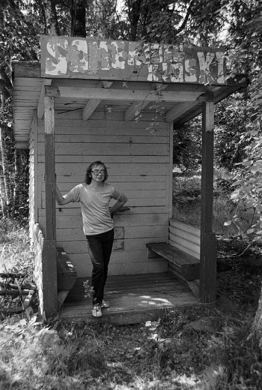 Rauli Badding Somerjoki suvun kioskilla kesällä 1984